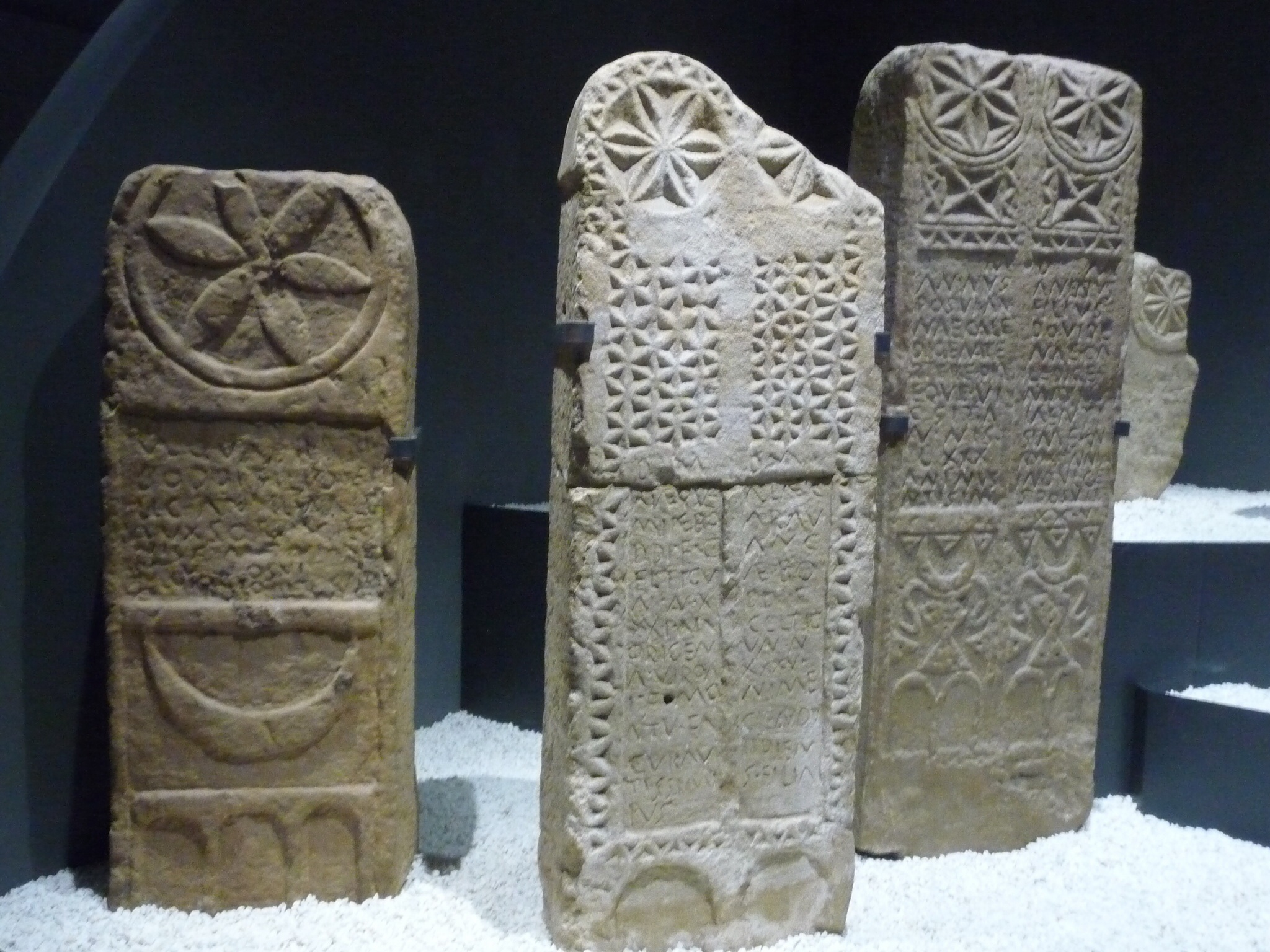 Formaban parte de la muralla tardía de Monte Cildá (Olleros de Pisuerga, Palencia, España). Presentan motivos geométricos, algunos quizá apotropaicos o simplemente decorativos; ubicación en Museo de Prehistoria y Arqueología de Cantabria (Santander, España) Hispania Epigraphica Online Hispania Epigraphica Online Hispania Epigraphica Online